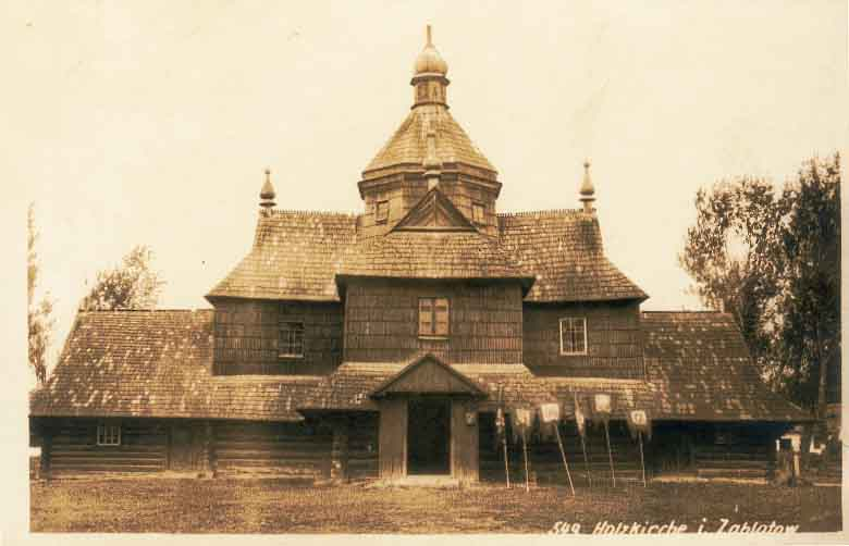 Церква у Заболотові, знімок 1916 року